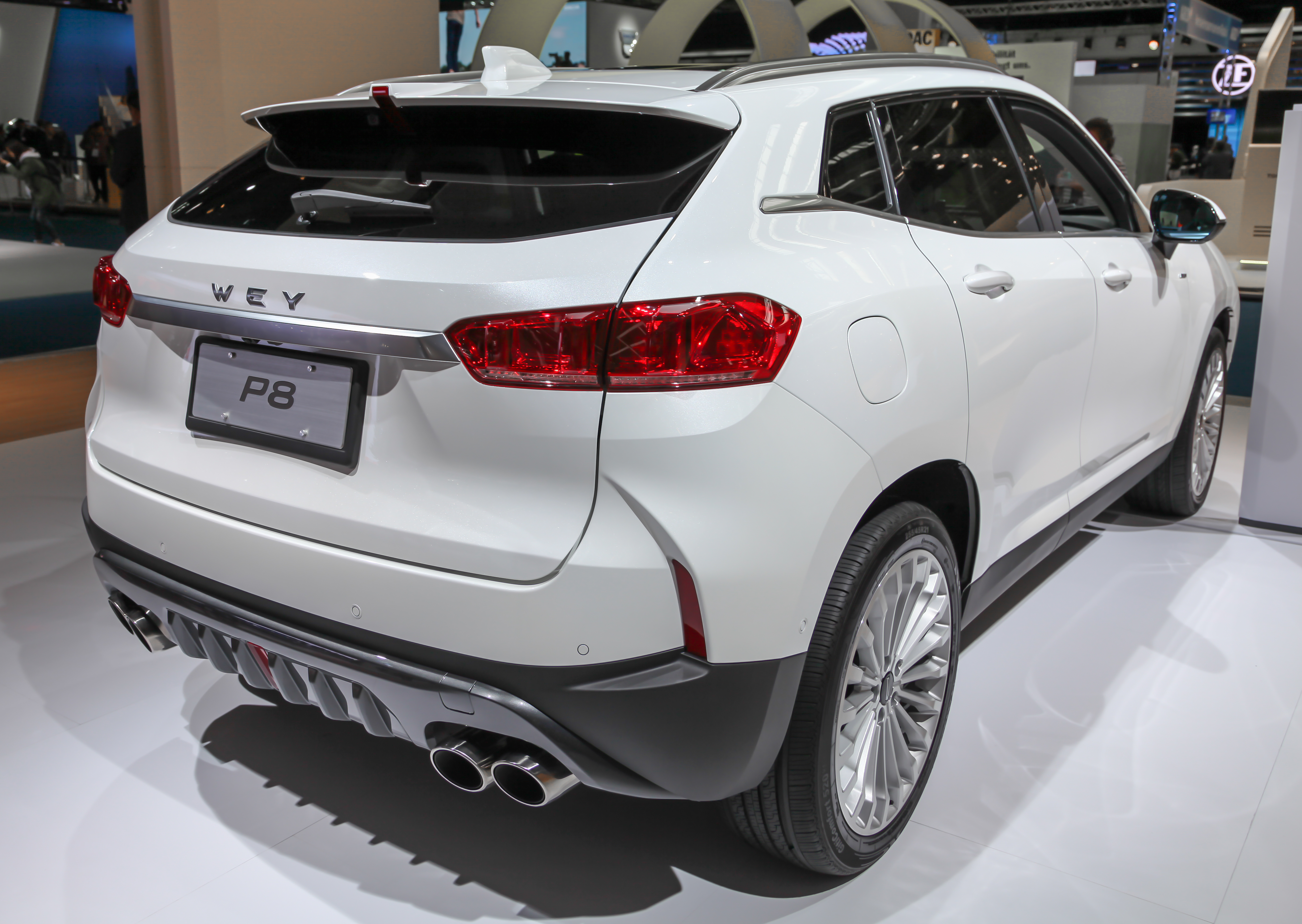 Wey P8